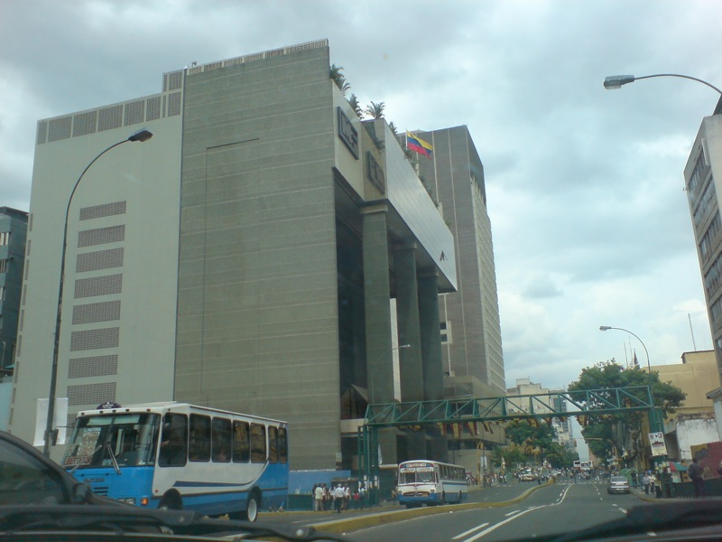 Ministerio de Finanzas, Caracas, Venezuela